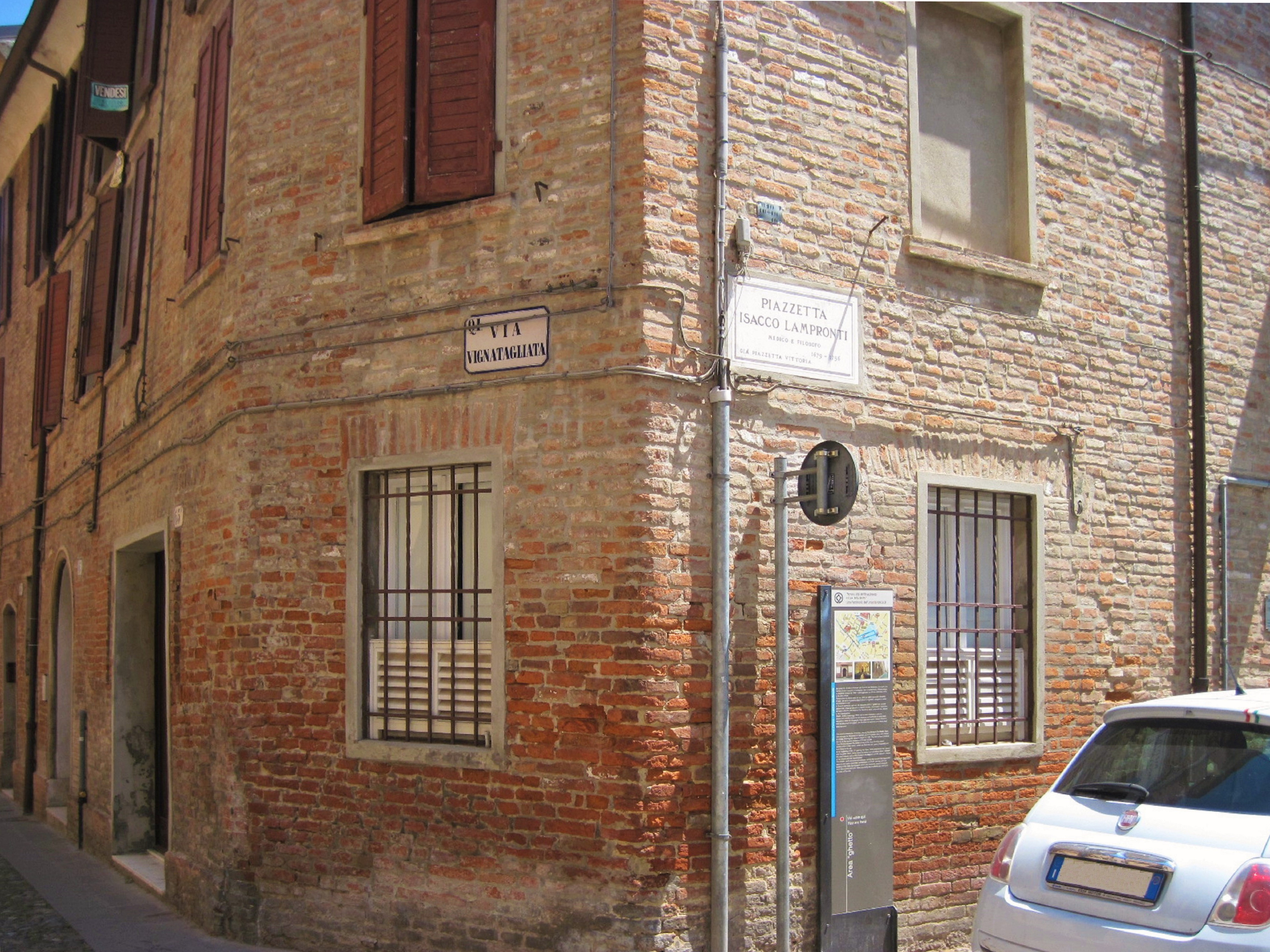 Ex ghetto ebraico di Ferrara - Piazzetta Isacco Lampronti. Angolo con via Vignatagliata.